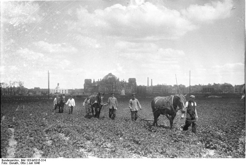 ADN-ZB/Donath Berlin, Juli 1946 Teile des zerstörten Tiergartens wurde in den ersten Nachkriegsjahren für landwirtschaftliche Zwecke genutzt. Im Hintergrund. v.l.n.r.: Ehrenmal für die gefallenen sowjetischen Soldaten, Reichstag, Brandenburger Tor.